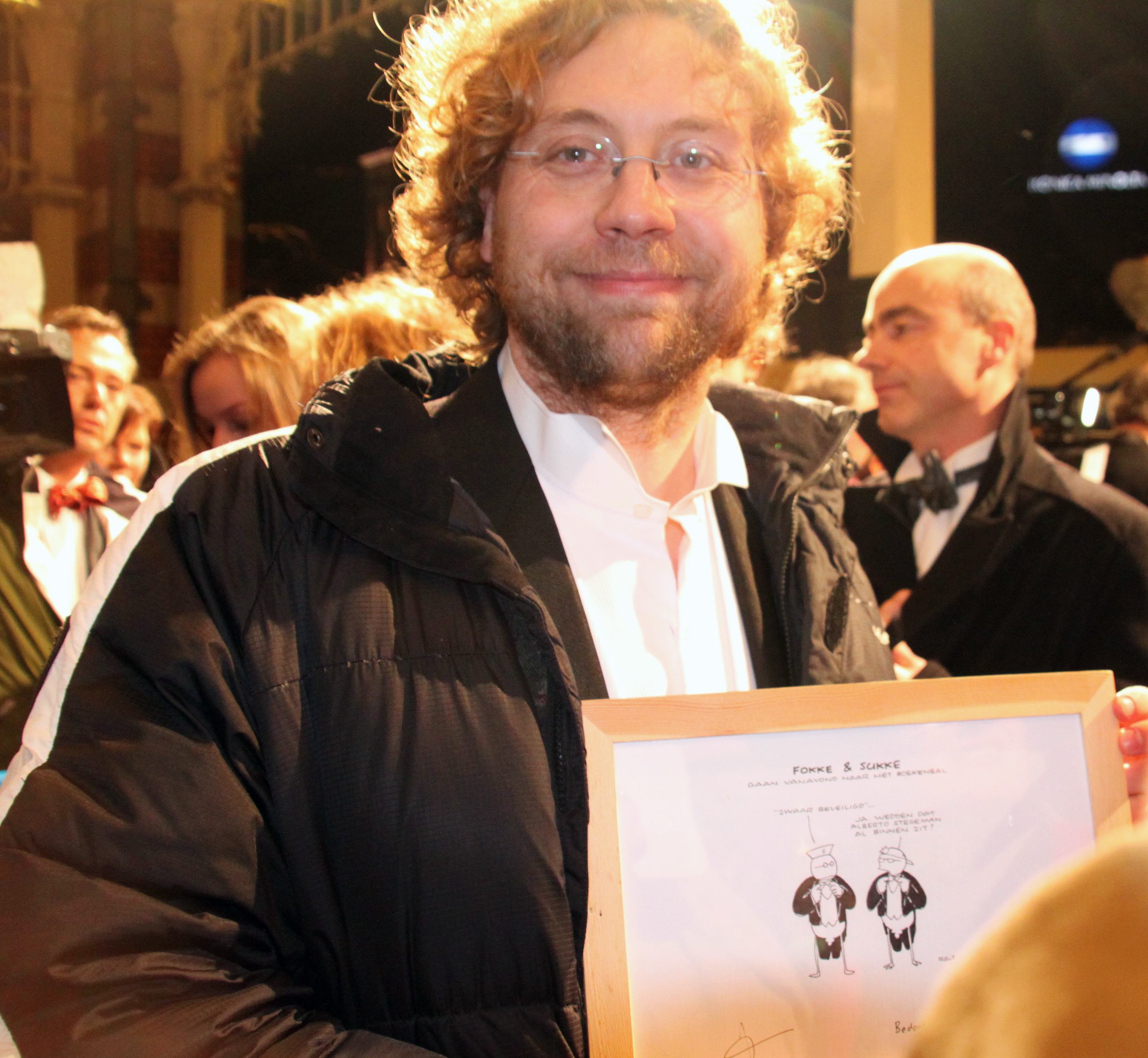 Jean-Marc van Tol